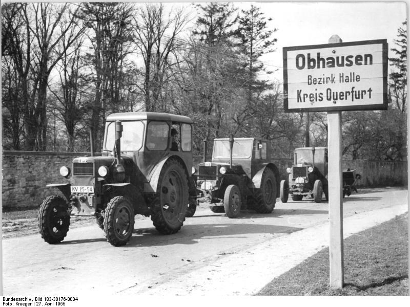 Obhausen, Traktoren der MTS Zentralbild Krueger 27.4.1955 MTS "Wilhelm Pieck" in Obhausen - Initiator des vorbildlichen Planes zur Steigarung der landwirtschlaftlichen Produktion Traktoren der Brigade I, die in Obhausen stationiert ist, verlassen das Dorf zum Schichtwechsel während der Frühjahrsbestellung.